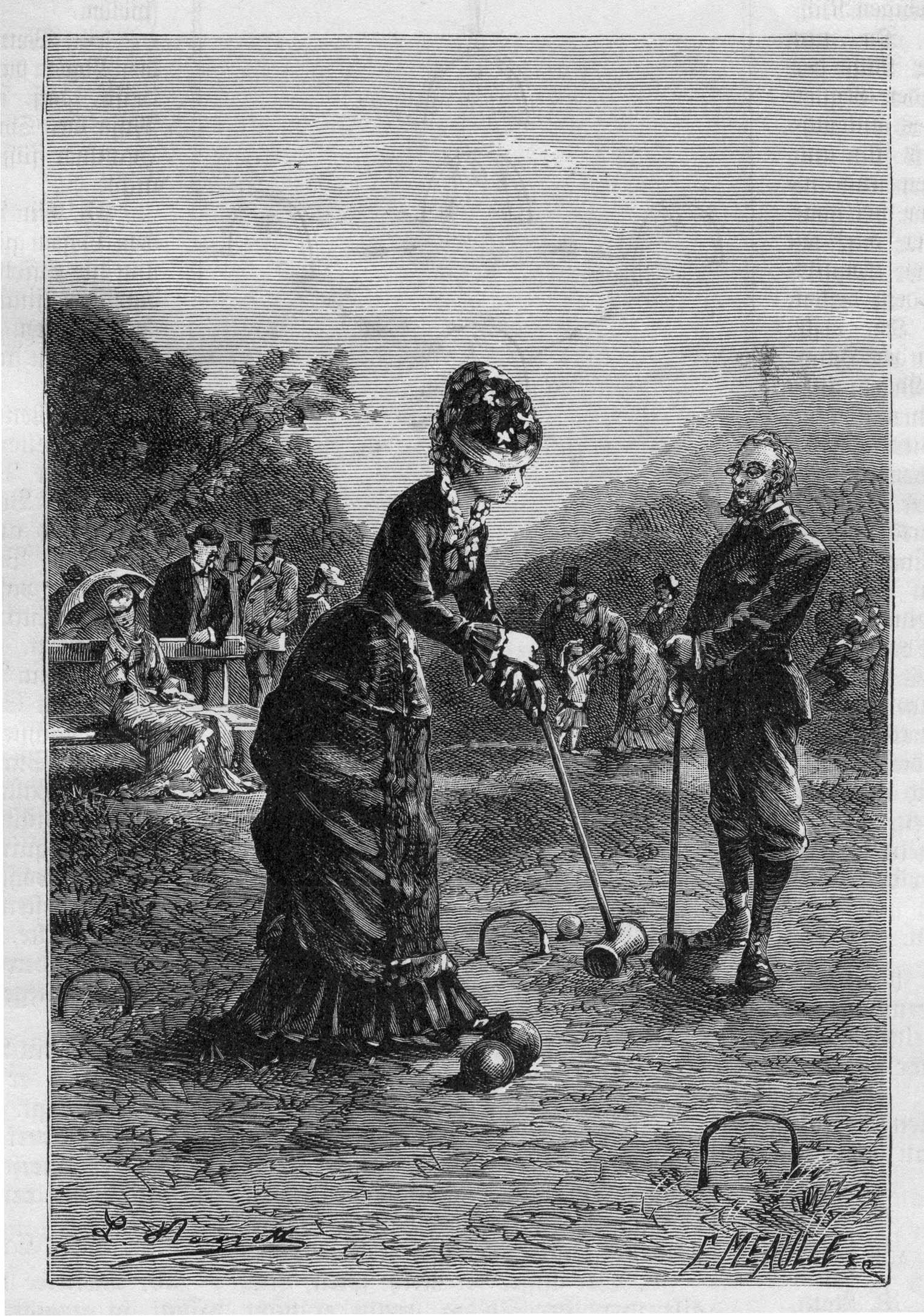 Léon Benett, Fortuné-Louis Méaulle: Croquet